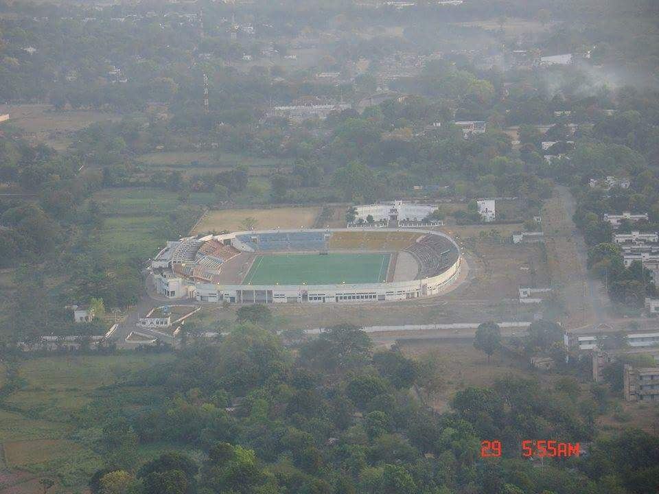 rourkela